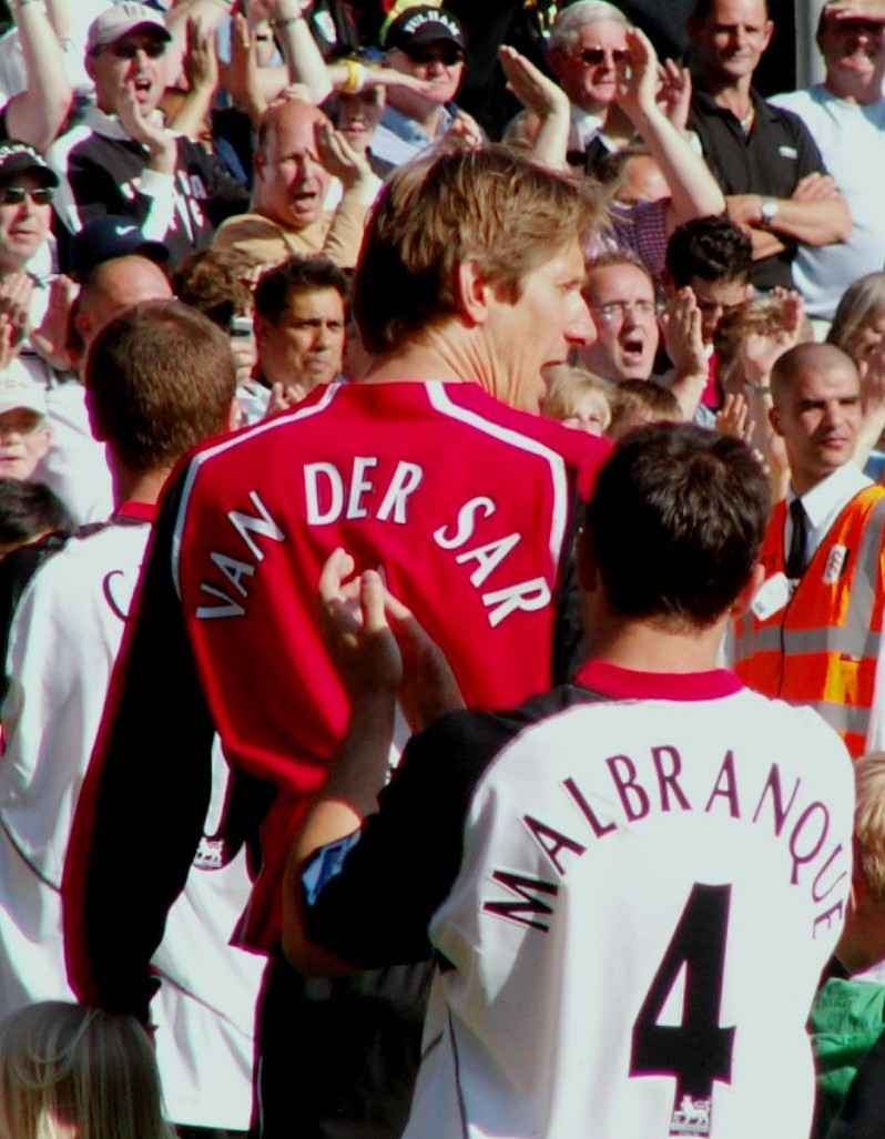 Edwin van der Sar with Fulham.